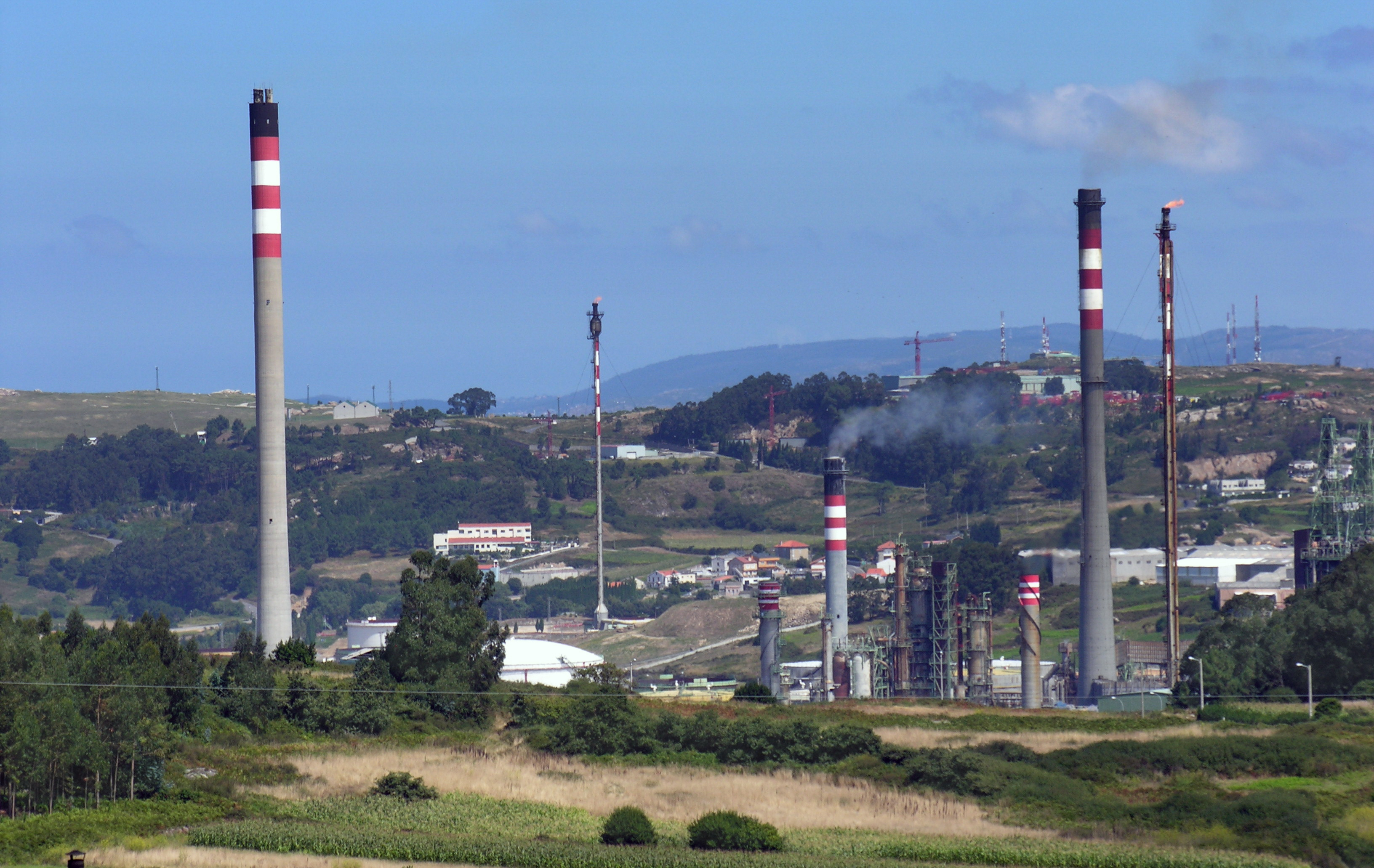 A refinería de petróleo de Repsol, no Polígono Industrial da Grela-Bens (A Coruña), vista dende Pastoriza, Arteixo, Provincia da Coruña, Galiza